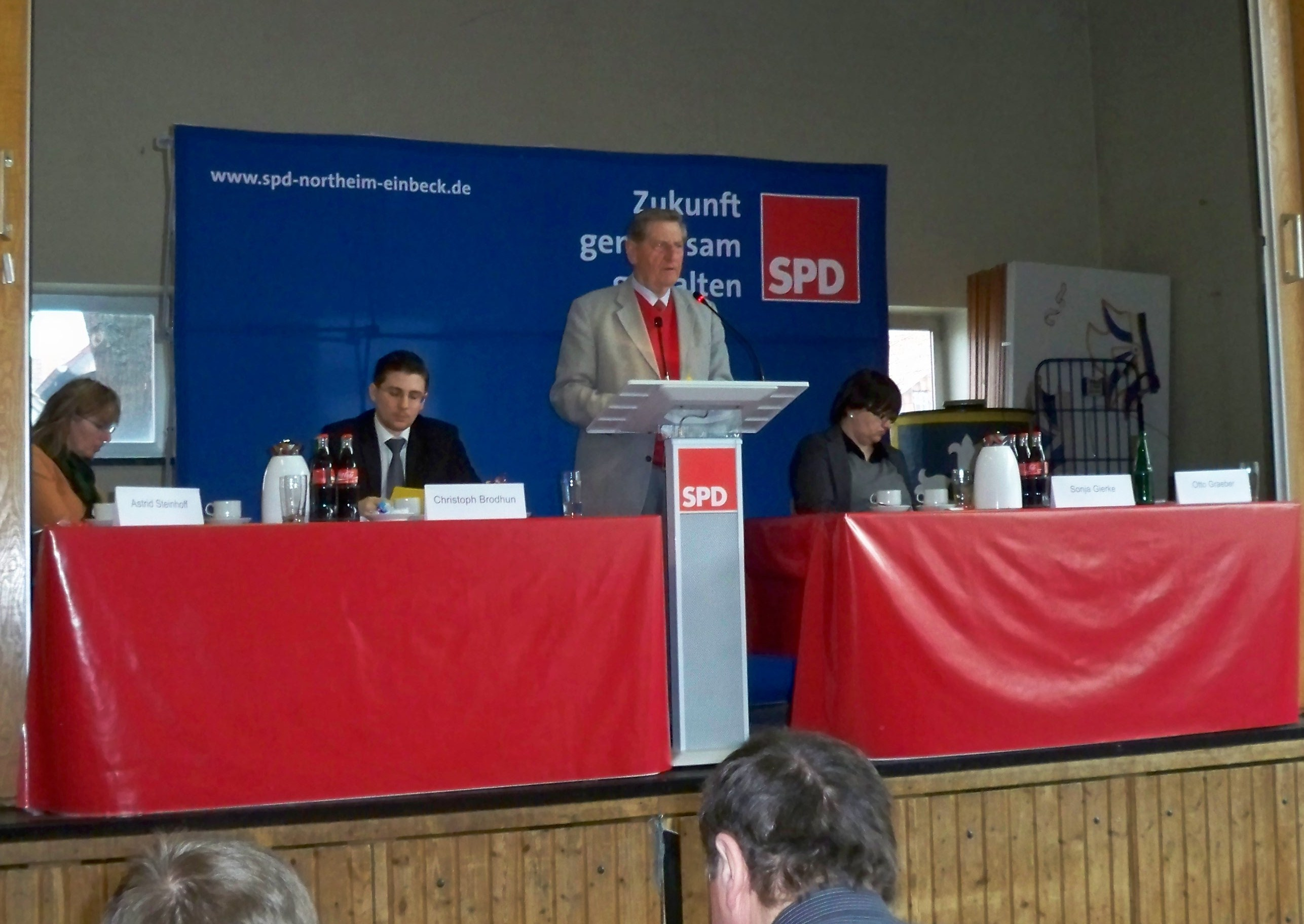 Otto Graeber spricht auf der Konferenz zur Nominierung der Landtagskandidaten des SPD-Unterbezirks Northeim-Einbeck zur Landtagswahl 2013 am 10. März 2012 in Northeim-Höckelheim. Abgebildete Personen, von links: Astrid Steinhof, Unterbezirksvorstandsmitglied Christoph Brodhun, Unterbezirksvorsitzender Jusos Otto Graber, Bürgermeister a.D. etc. Sonja Gierke, Unterbezirksvorstandsmitglied